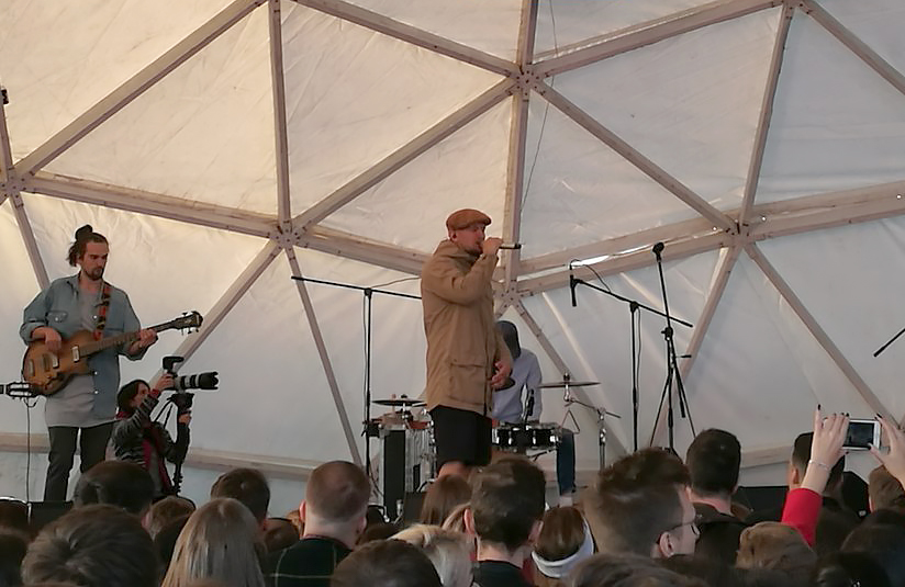 Концерт Krec в Петербурге, 31 мая 2018